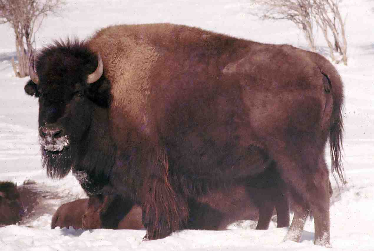 Bison - Alberta